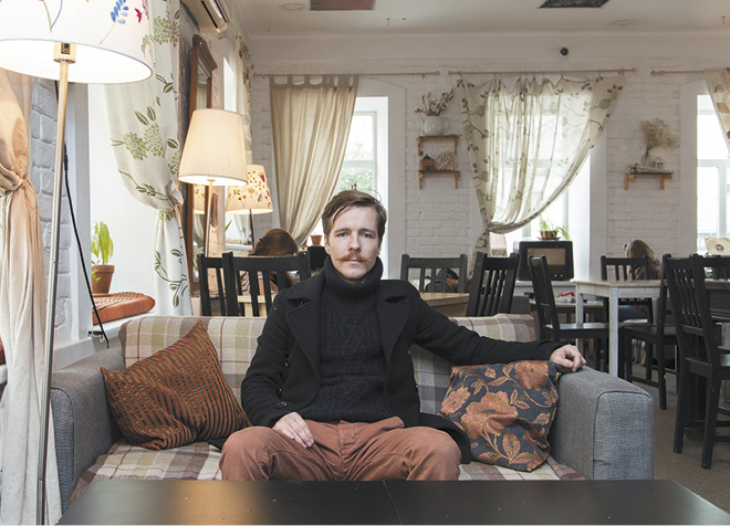 Иван Митин, основатель сети свободных пространств "Циферблат"